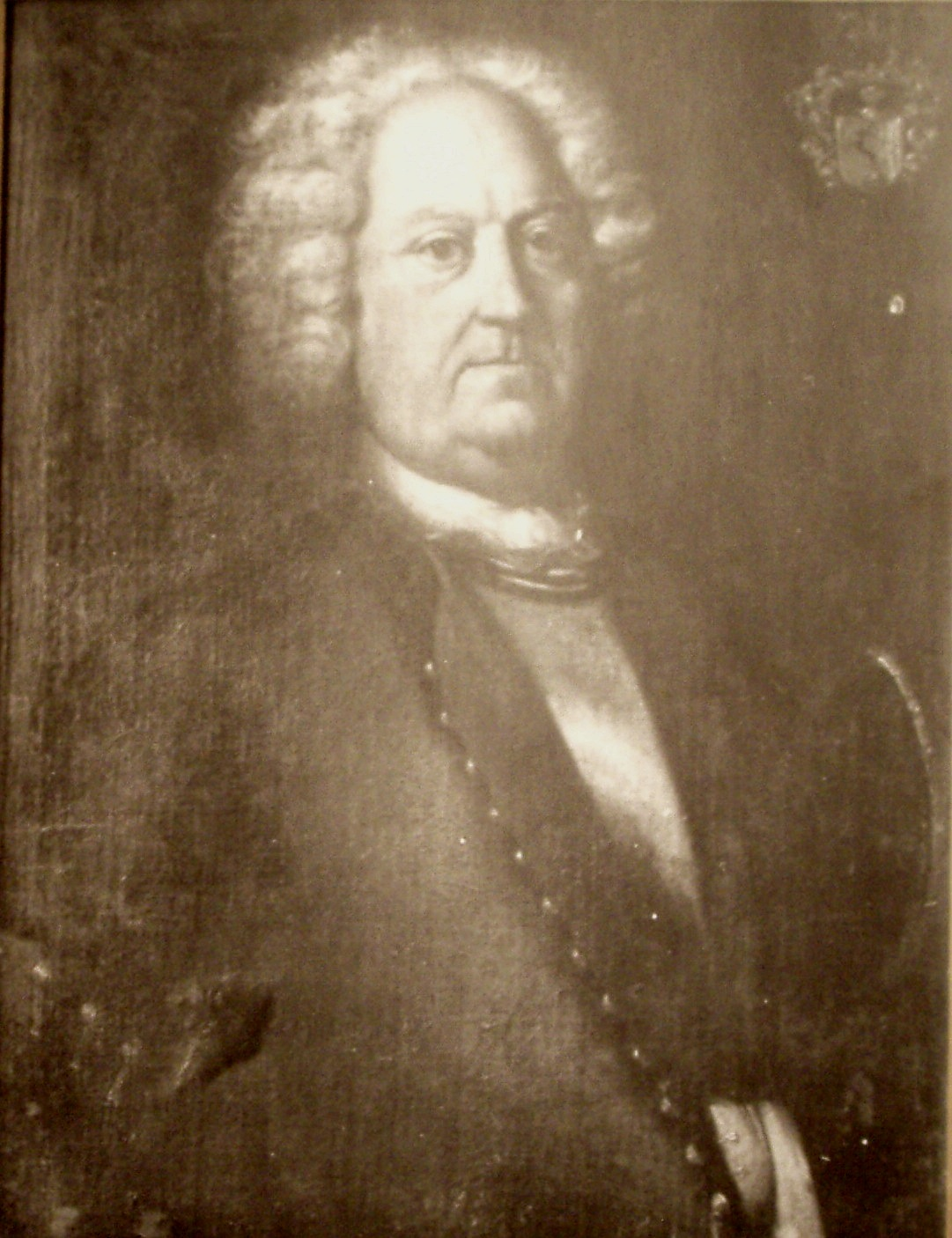 Portrait of Reinhold von Ramm (1665-1755).